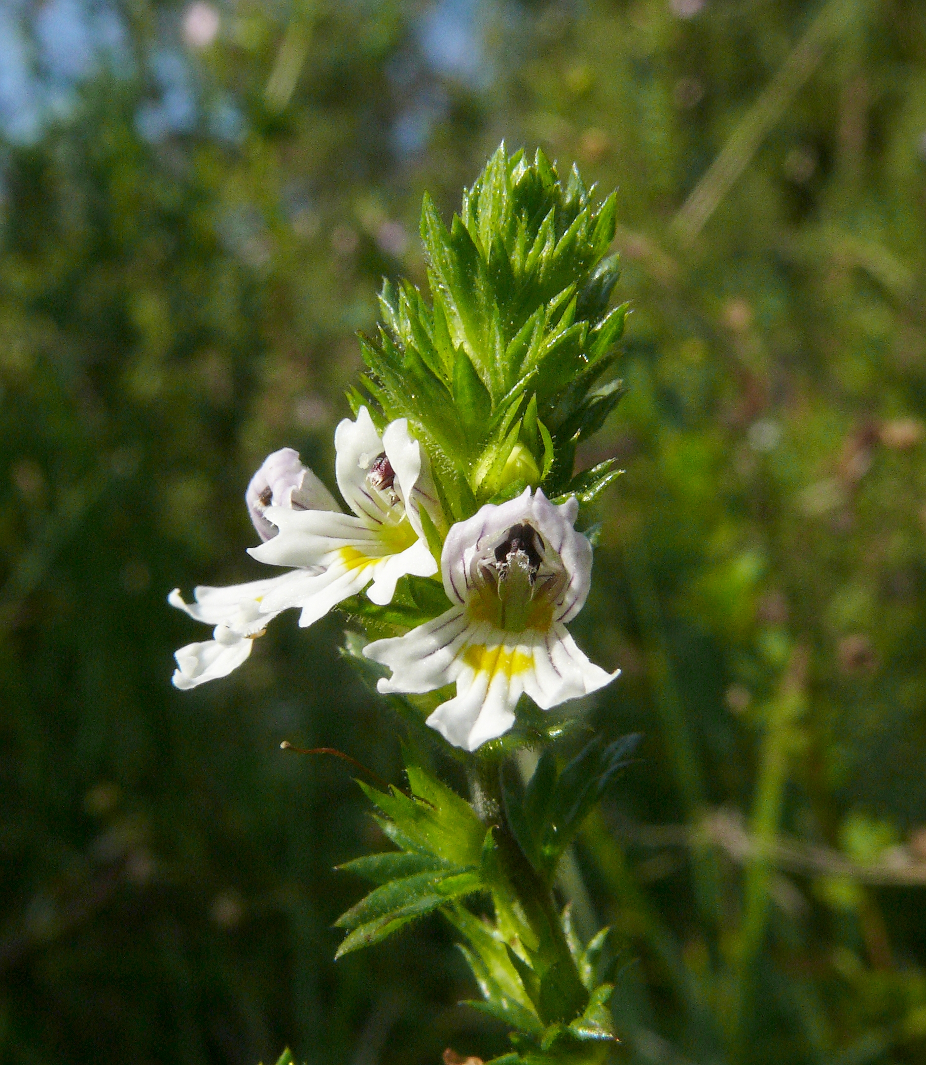 Euphrasia rostkoviana, Schwäbisch-Fränkische Waldberge, Germany